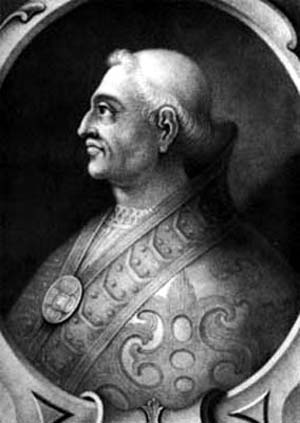 Pope Severin